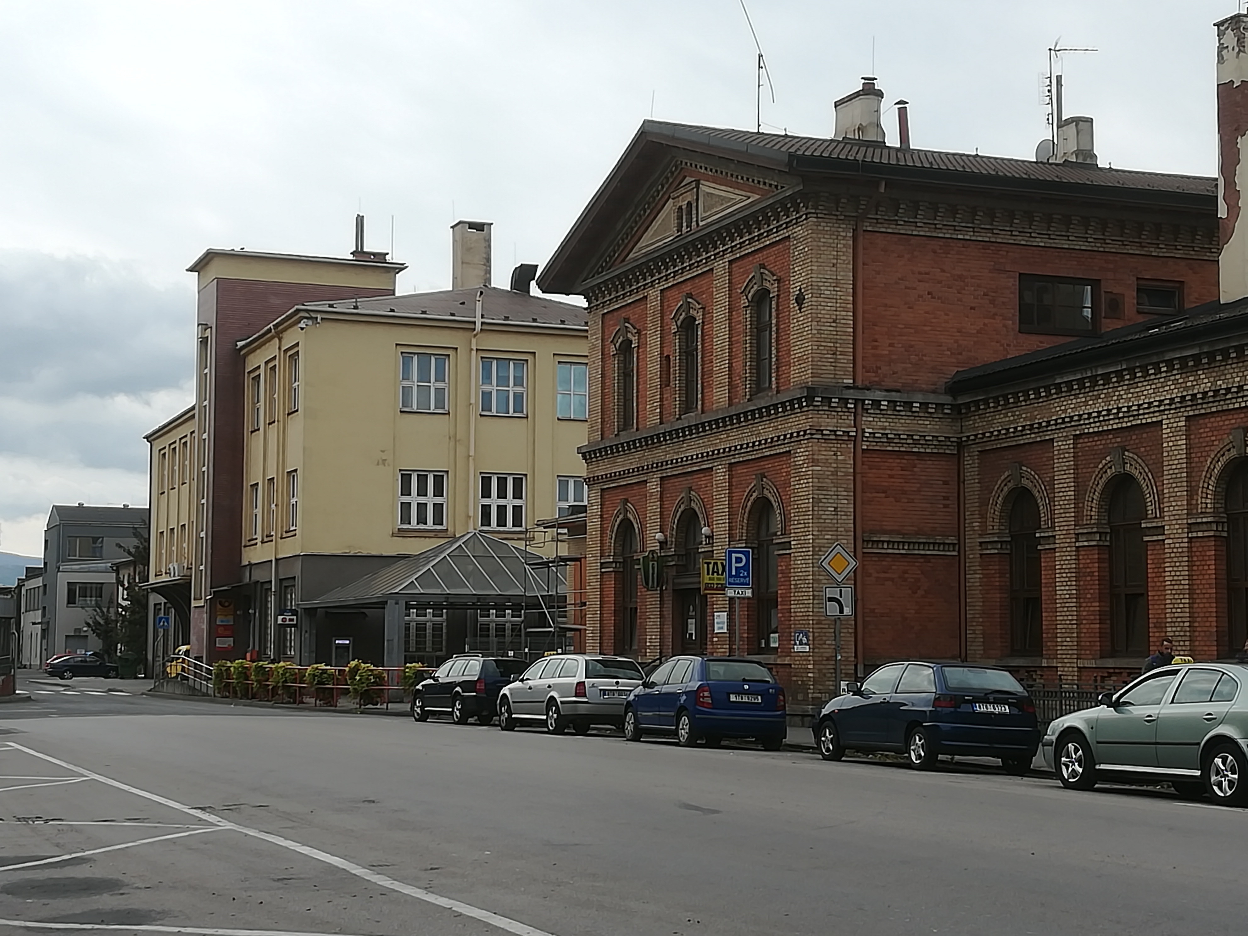 Český Těšín, pošta a nádraží